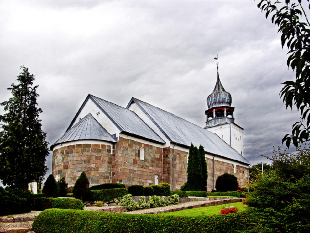 Andst kirke (Vejen) fra nordøst